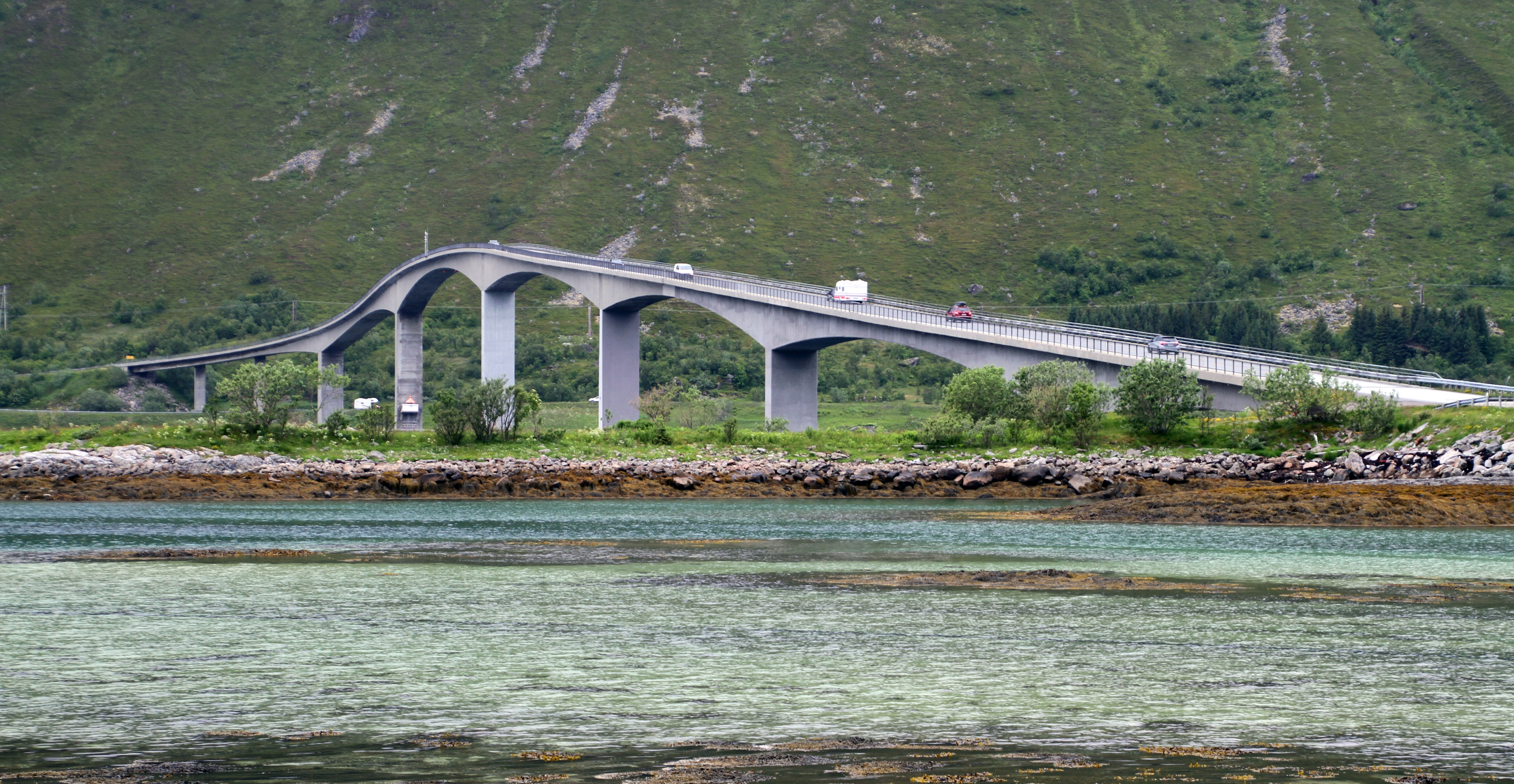 Gimsøystraumen-Bruecke zwischen Austvågøy und Gimsøy (Lofoten, Norwegen)